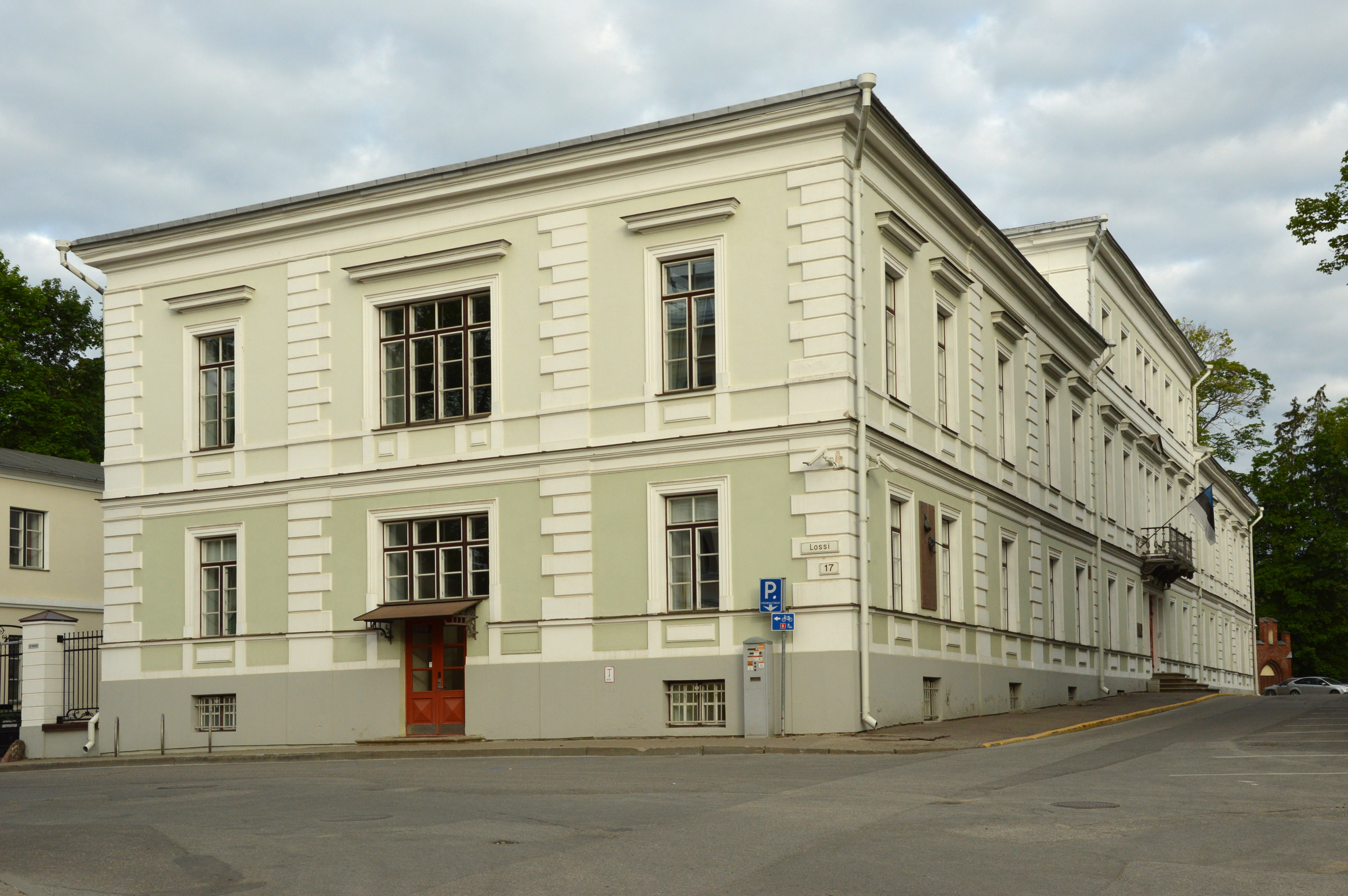 Riigikohtu hoone Toomemäel.